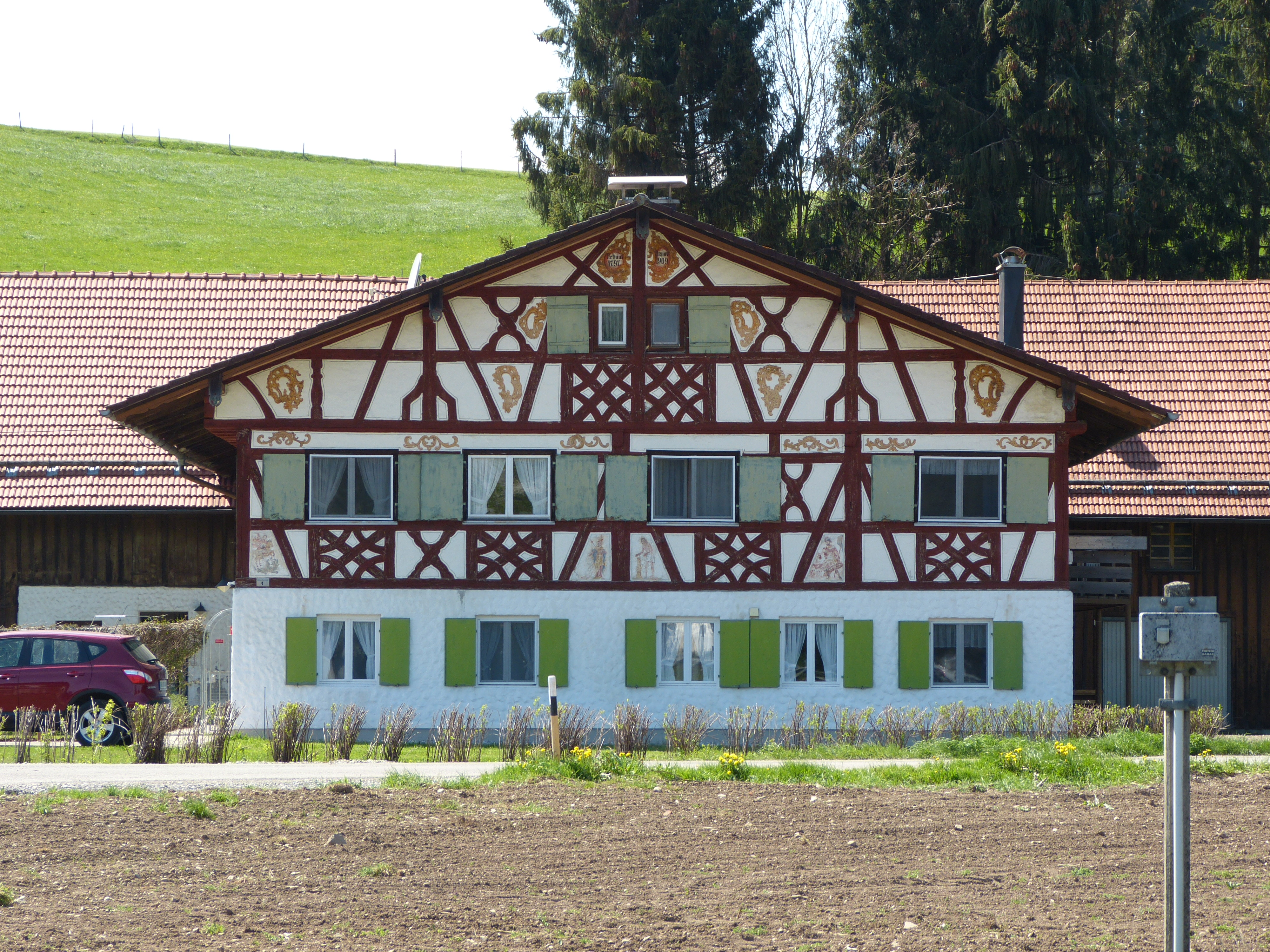 In der Tarrast, Ortsteil der Gemeinde Bad Grönenbach, Landkreis Unterallgäu, Bayern